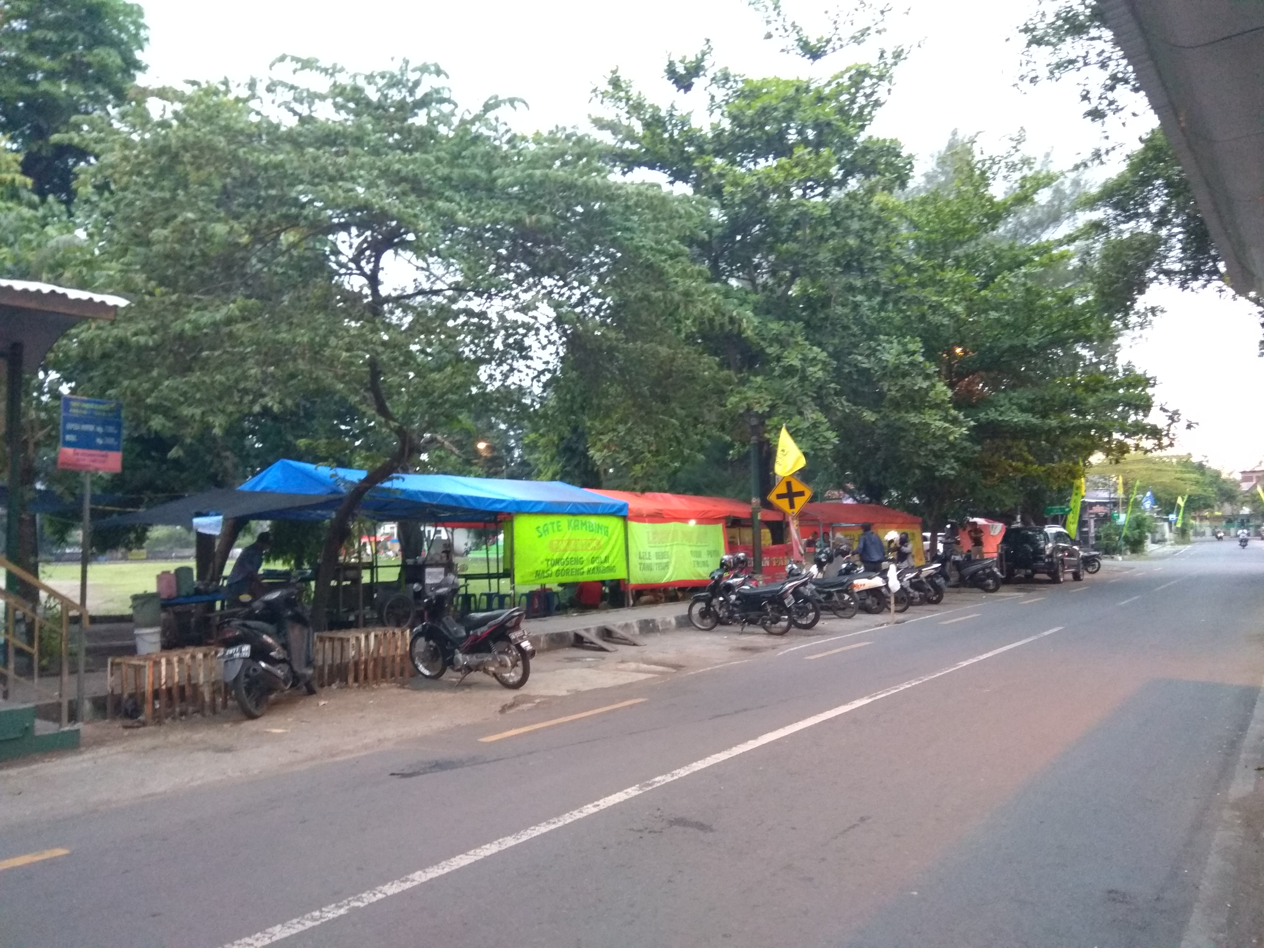 Warung Makan Taman Karang